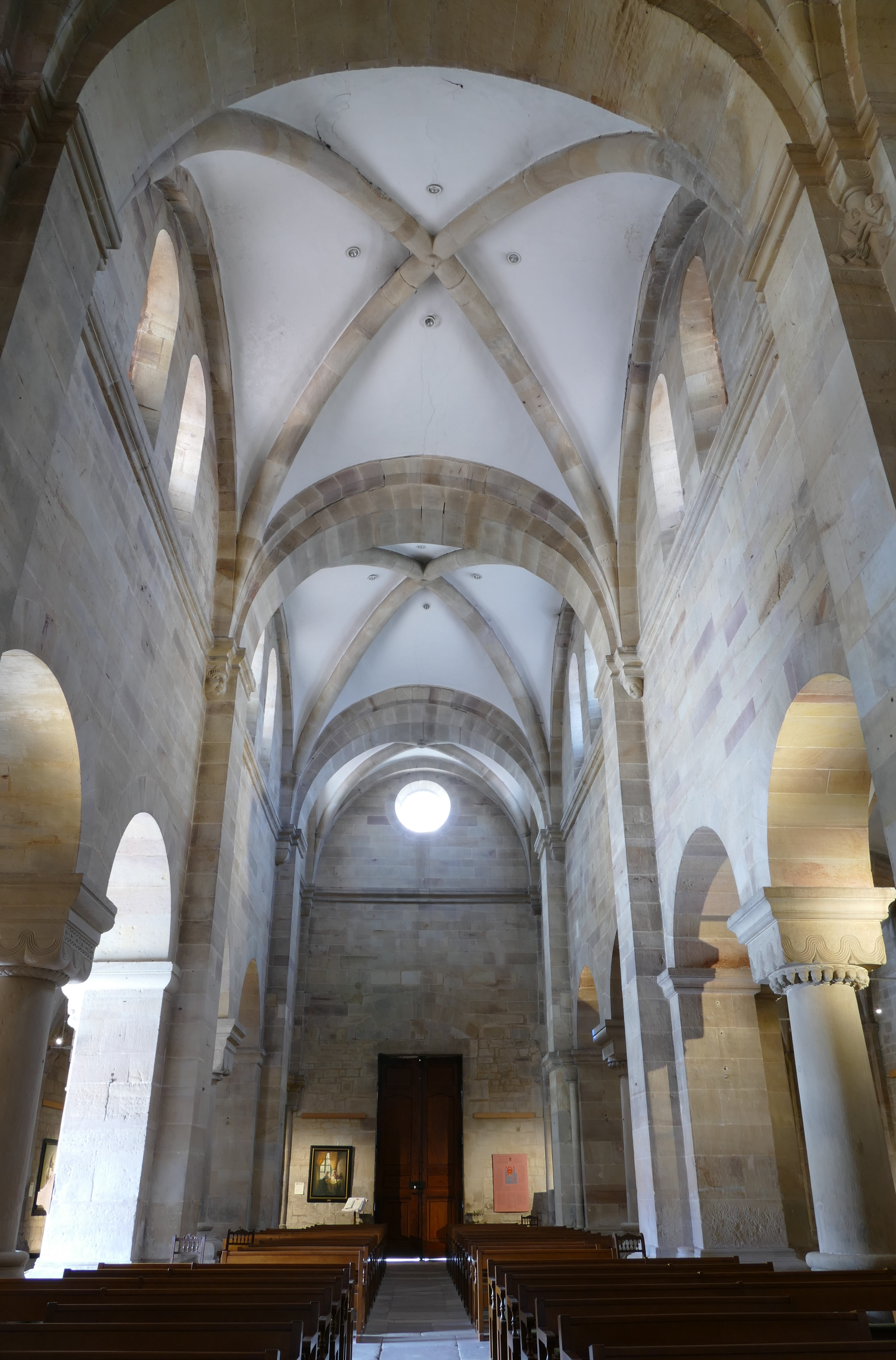 Alsace, Bas-Rhin, Rosheim, Église romane Saints-Pierre-et-Paul (XIIe) (PA00084909, IA00075638): Vue intérieure de la nef.